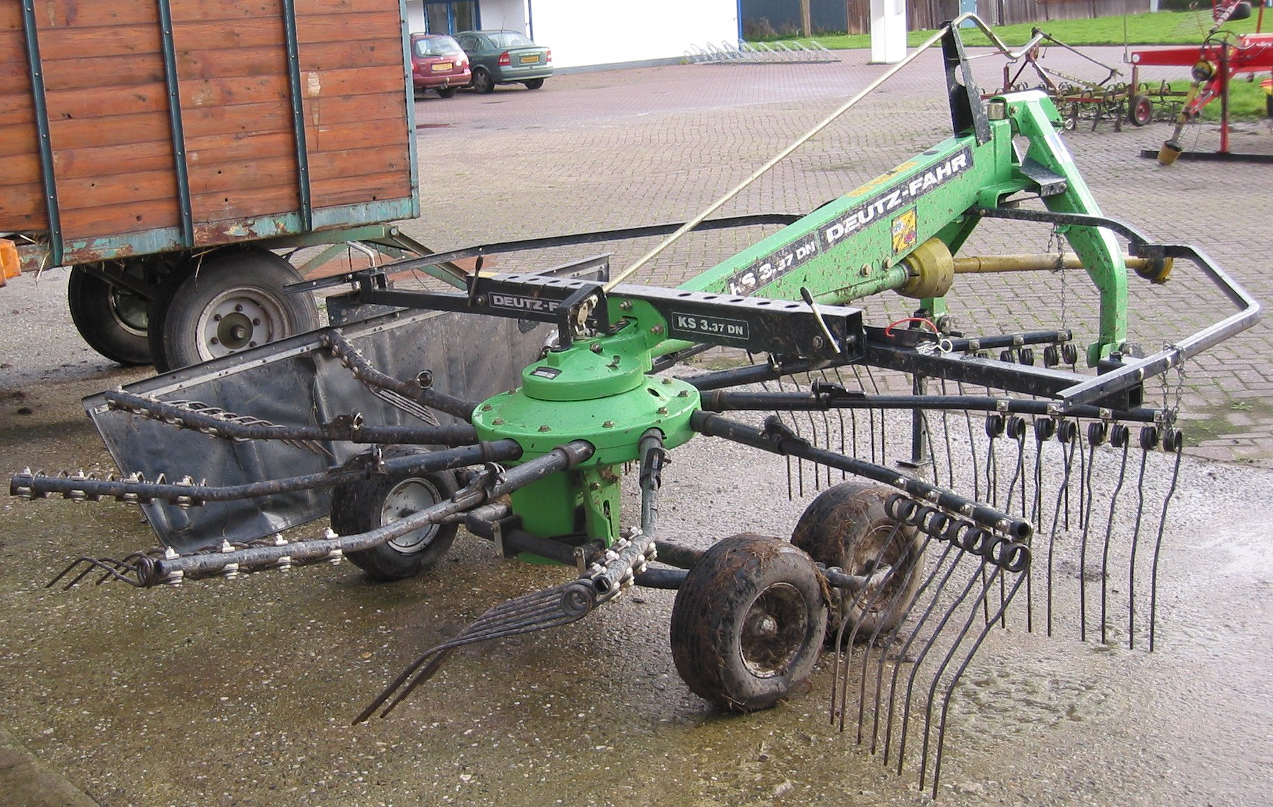 Kreiselschwader KS 3.37 DN von Deutz-Fahr, Arbeitsbreite 3,70 m